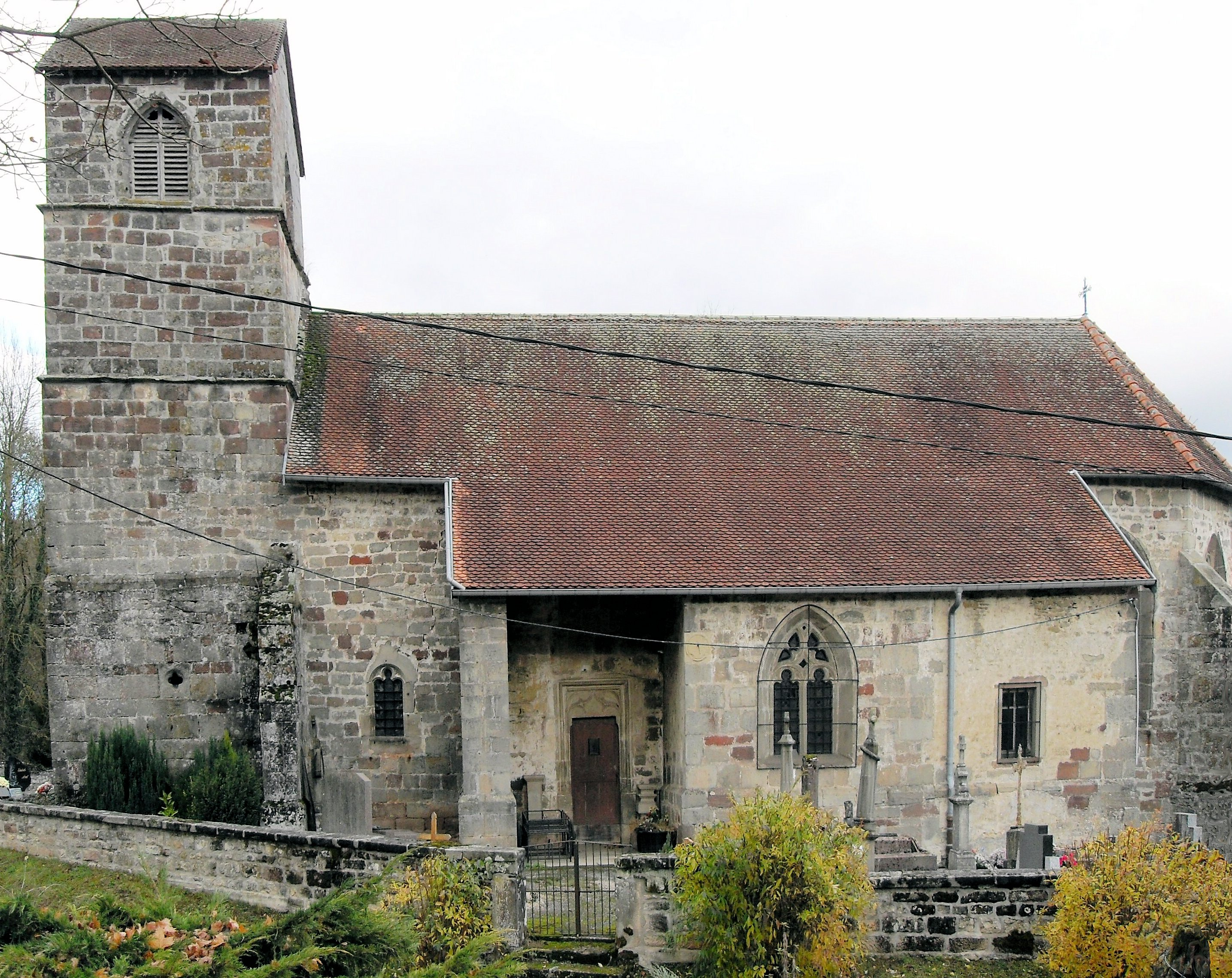 L'église Saint-Élophe à Viviers-le-Gras